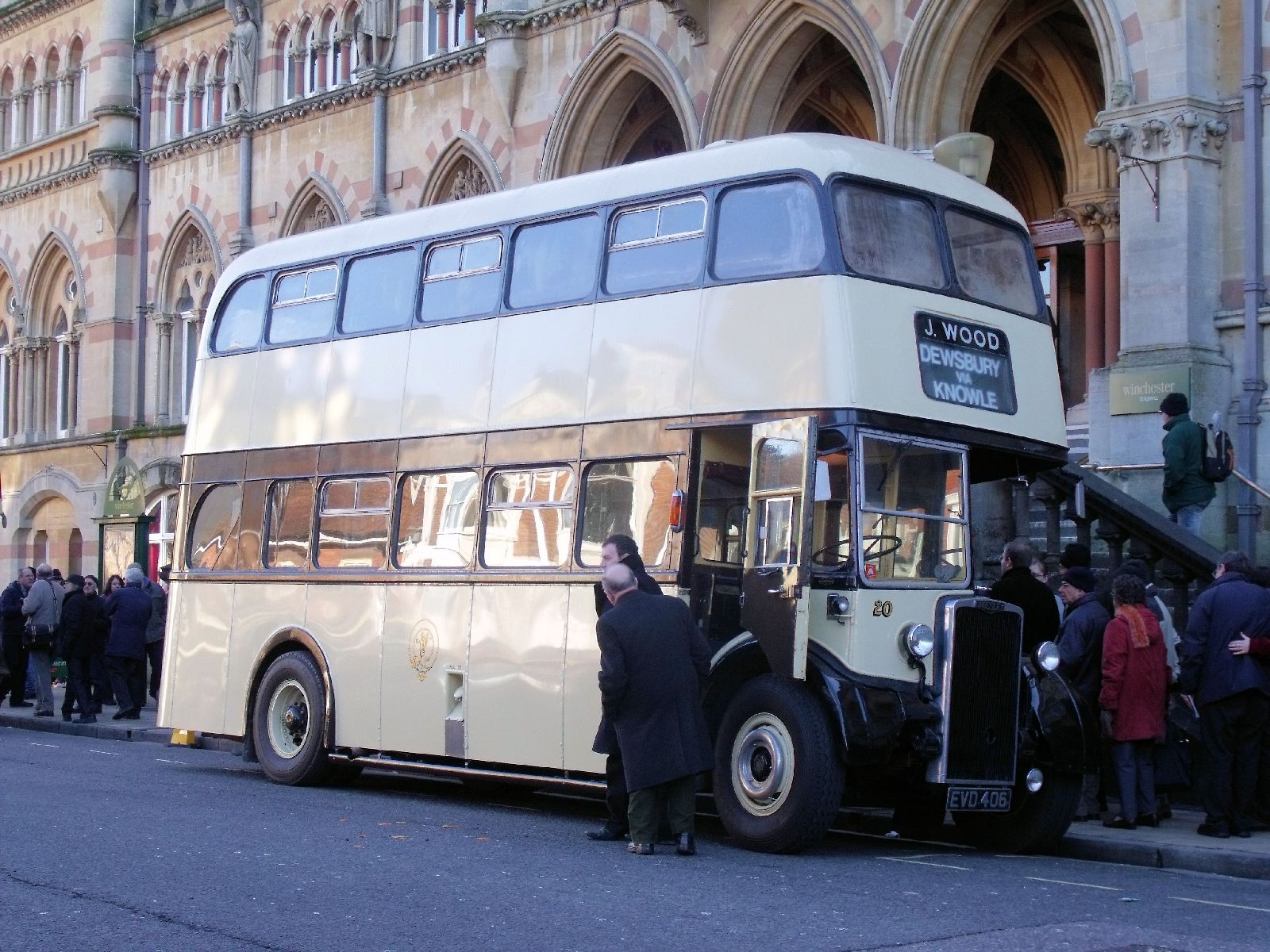 WOODMIR 20 EVD 406